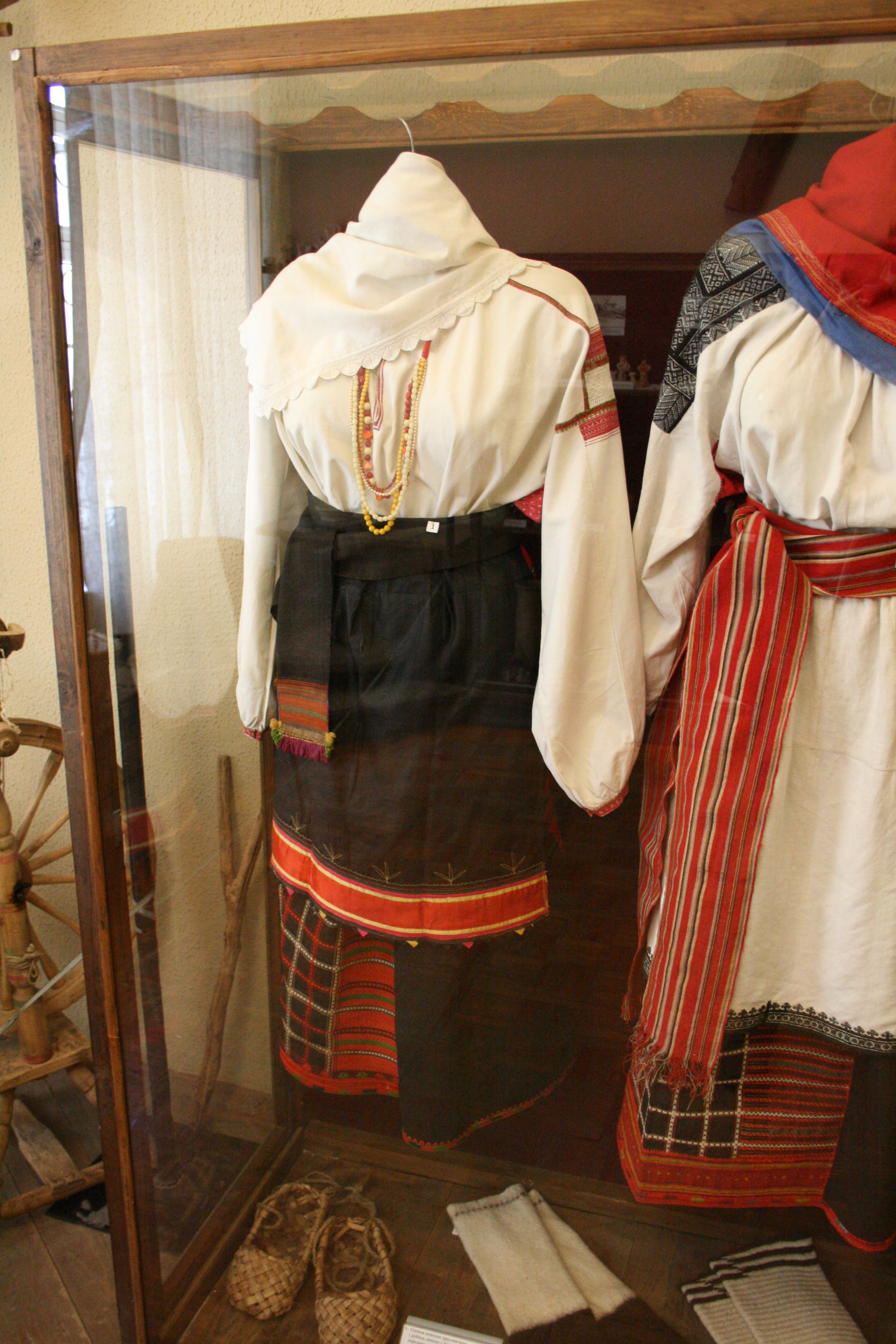 Одежда женская праздничная (рубаха, понёва с прошвой, платок, передник, пояс – покромка) села Роговатое, Старооскольский район. Конец XIX века. Из фондов Старооскольского краеведческого музея.